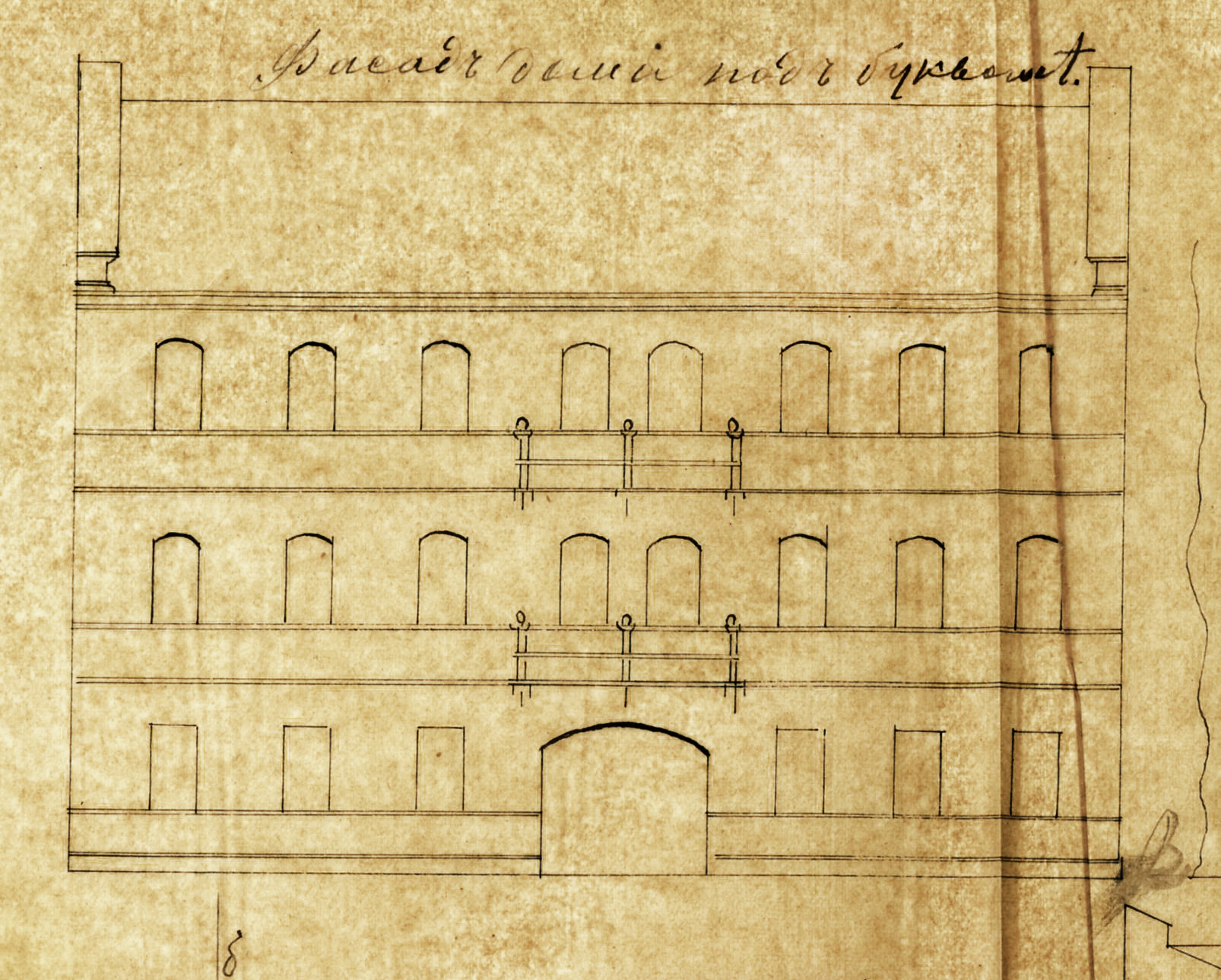 Беларуская (тарашкевіца): Менск (Miensk), вуліца Койданаўская (vulica Kojdanaŭskaja). Дом Сьлёзбэрга (Ślozberg)